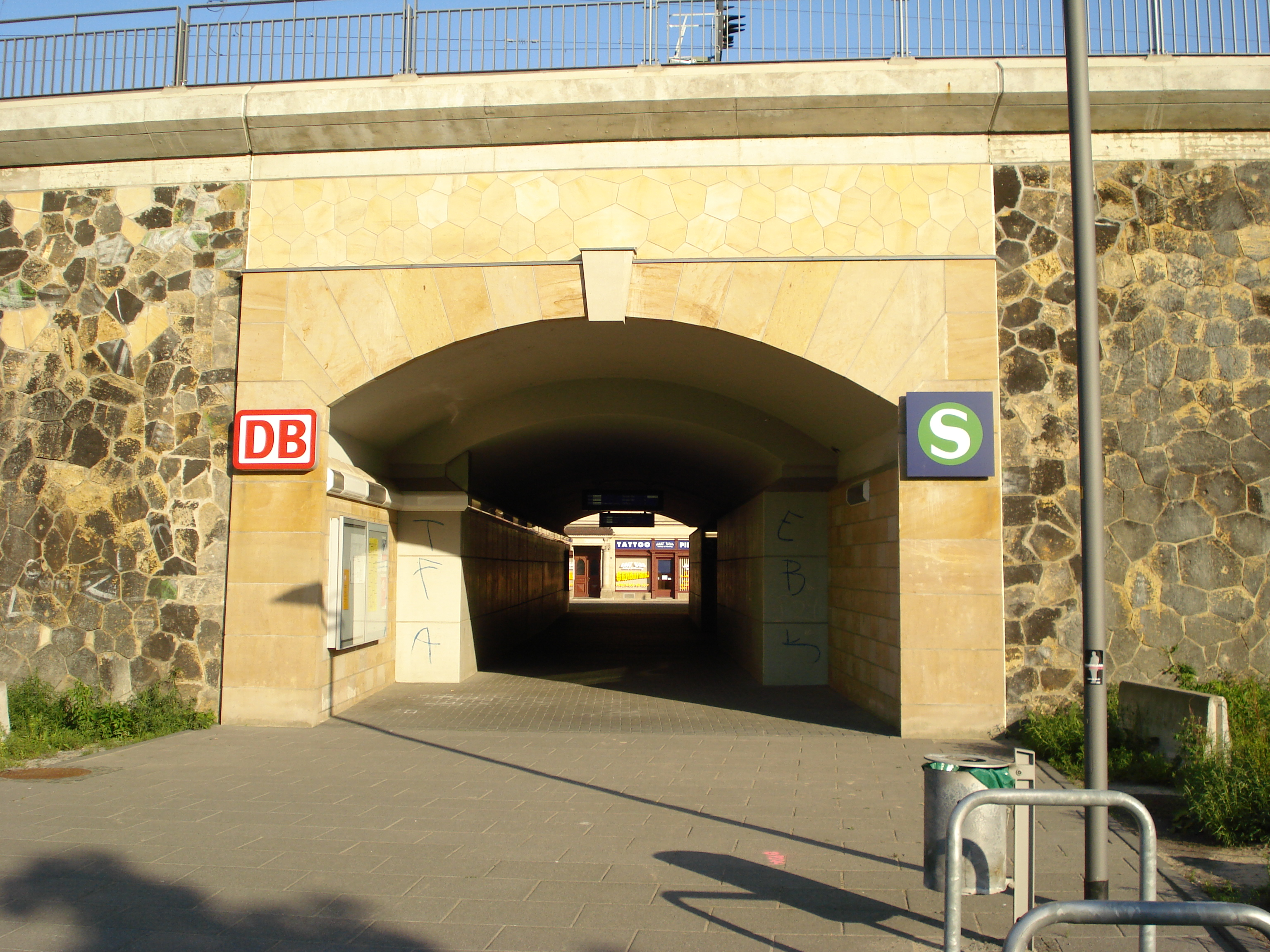 The Station Dresden Mitte.